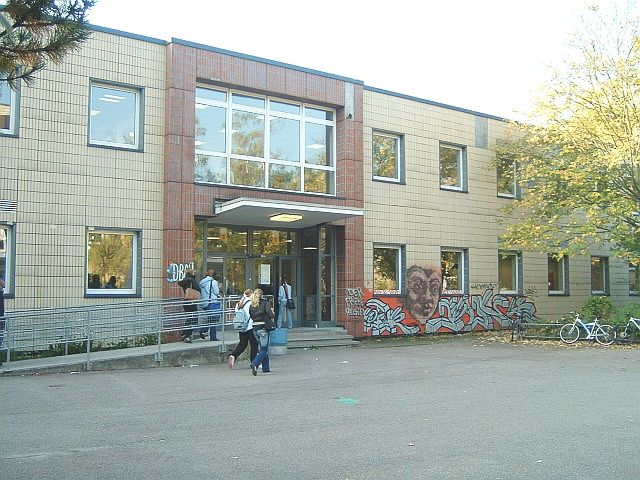 Ernst-Reuter Schule in Frankfurt Main, Artikel siehe , selbst fotografiert am 12.10.2005--Peng 09:17, 13 October 2005 (UTC)